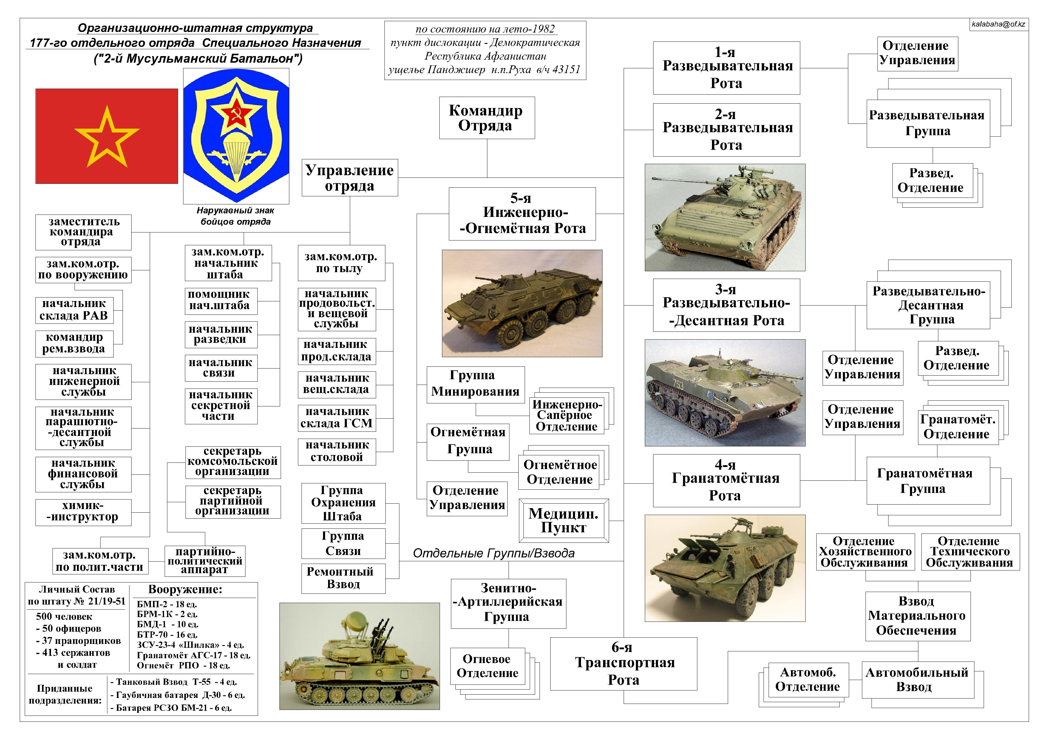 Организационно-штатная структура 177-го отдельного отряда специального назначения на лето-1982. Собственная работа на основе данных взятых с сайтов а также данных, взятых из статьи бывшего командира 177-го оосн Бориса Тукеновича Керимбаева с сайта Отчерчено в AutoCAD 2005 собственноручно.